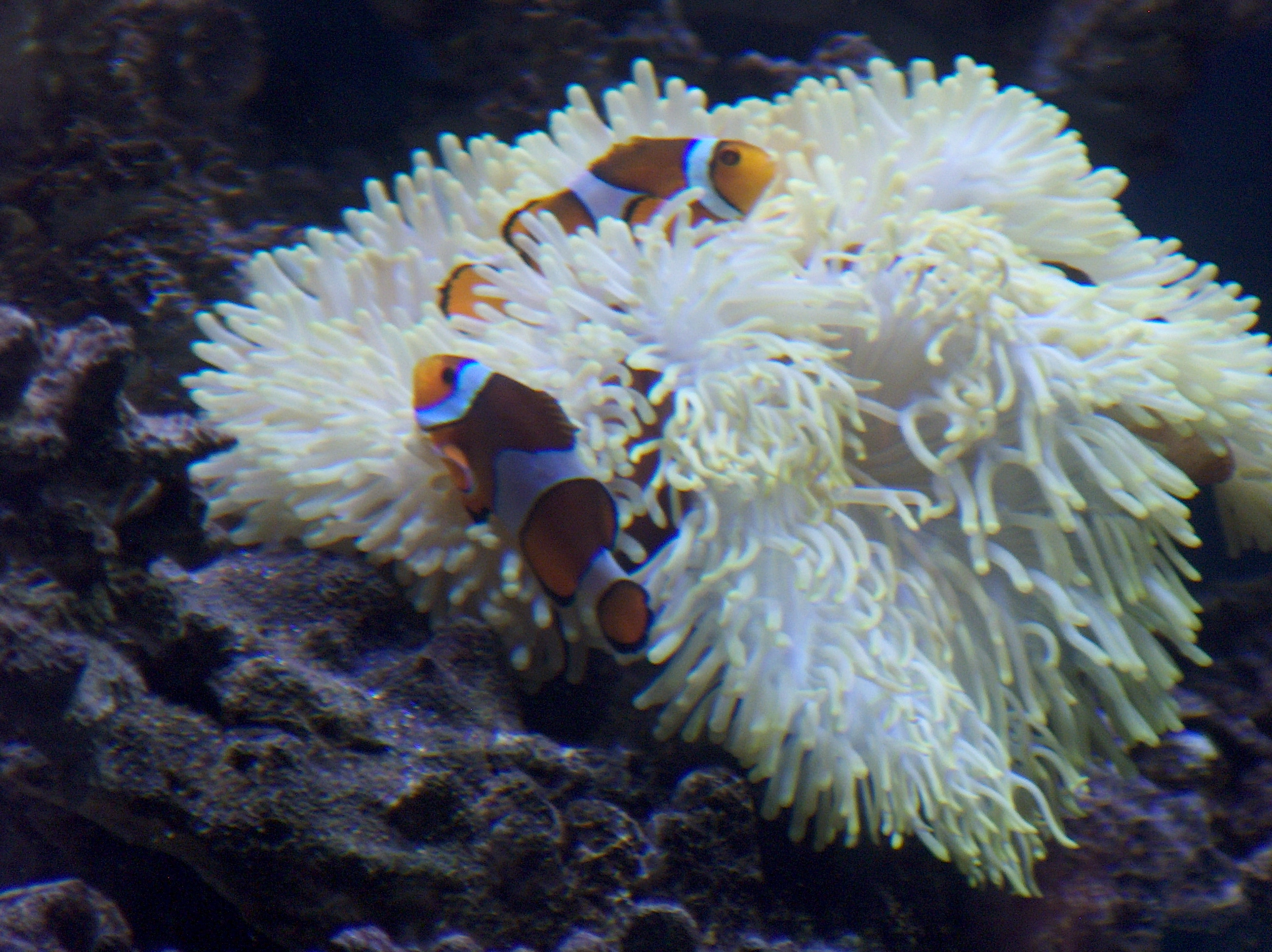 Amphiprion ocellaris